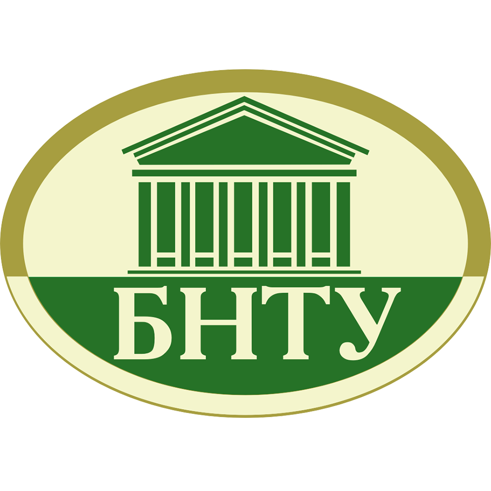 Лагатып БНТУ